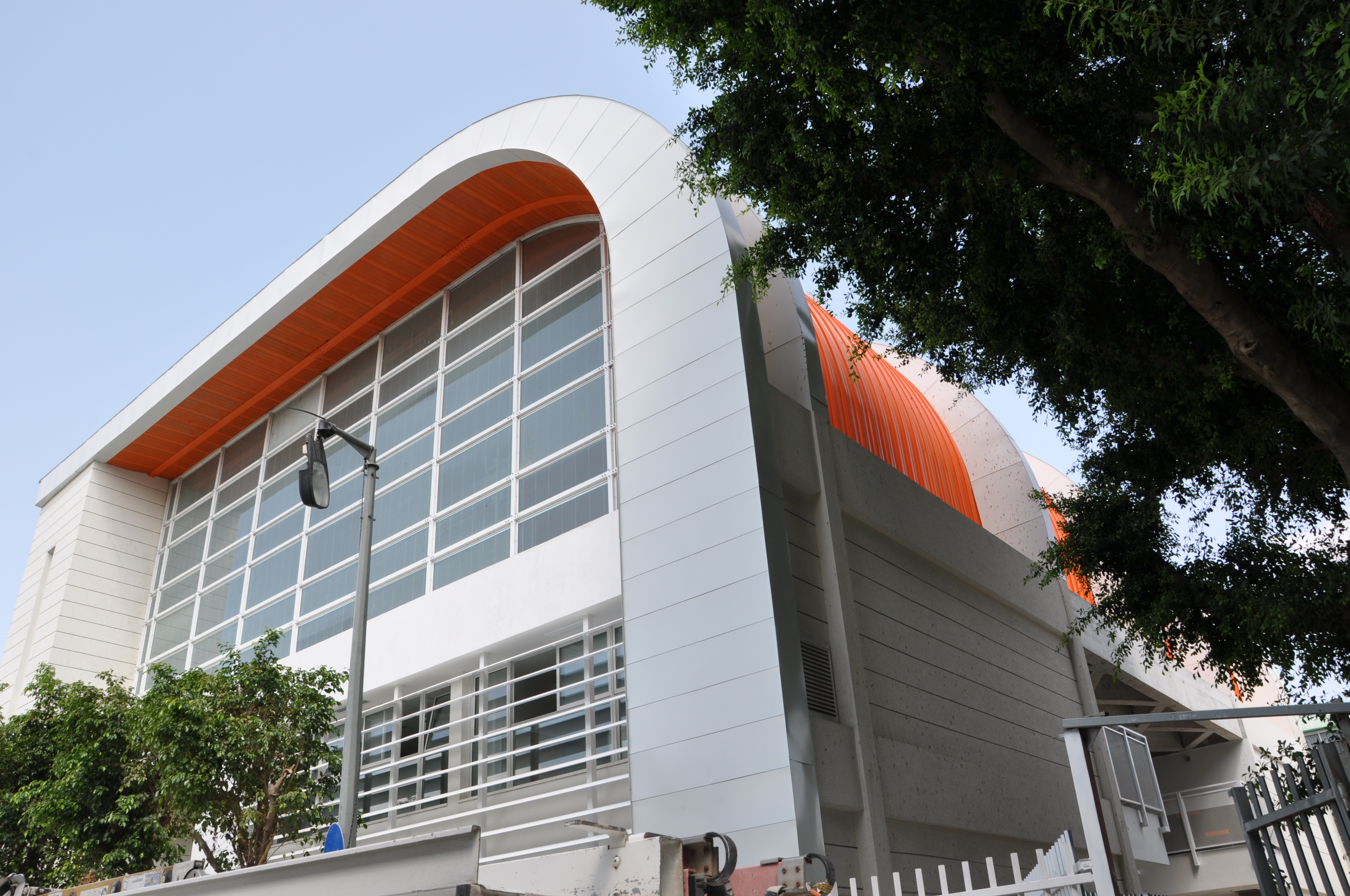 בית ספר מירון תל אביב בודק אדריכלים ואוברזון אדריכלים